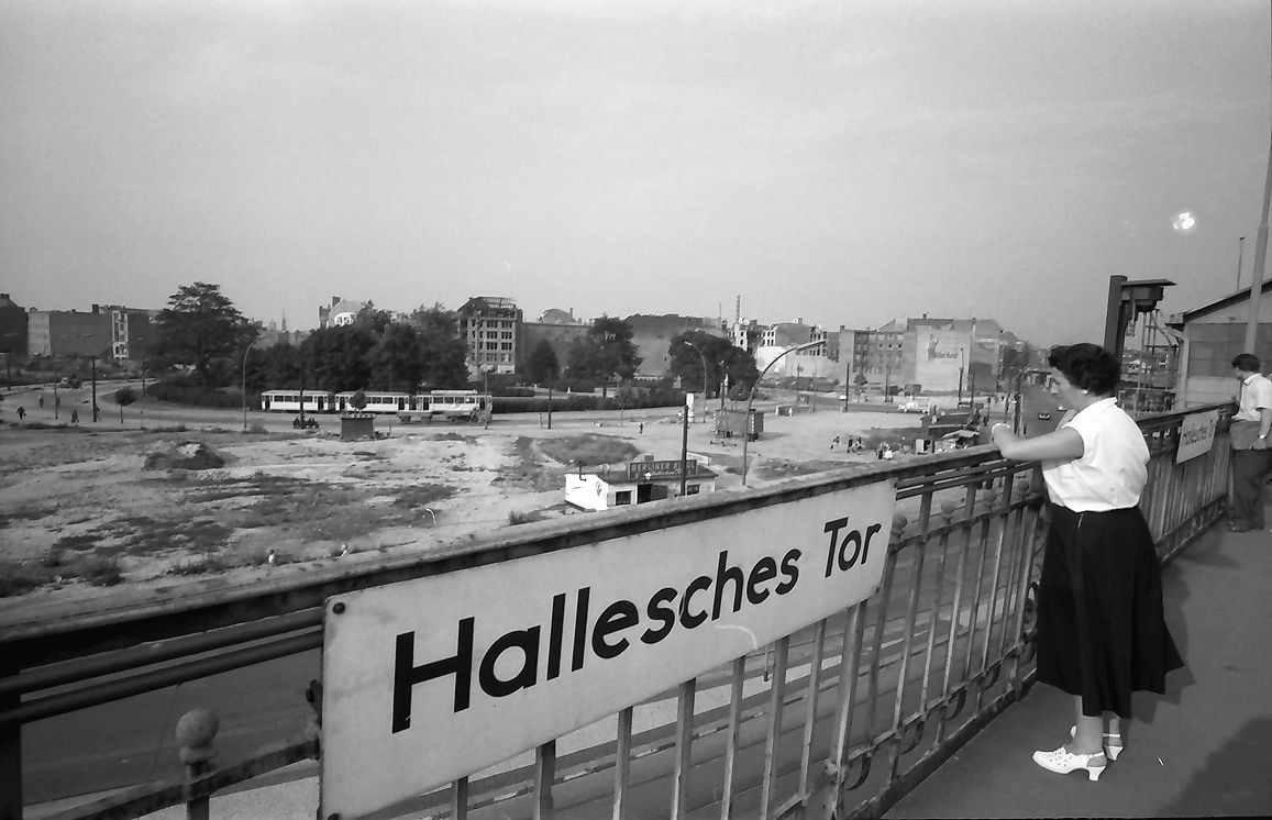 Blick vom U-Bahnhof Hallesches Tor auf den zerstörten Mehringplatz in Berlin-Kreuzberg.